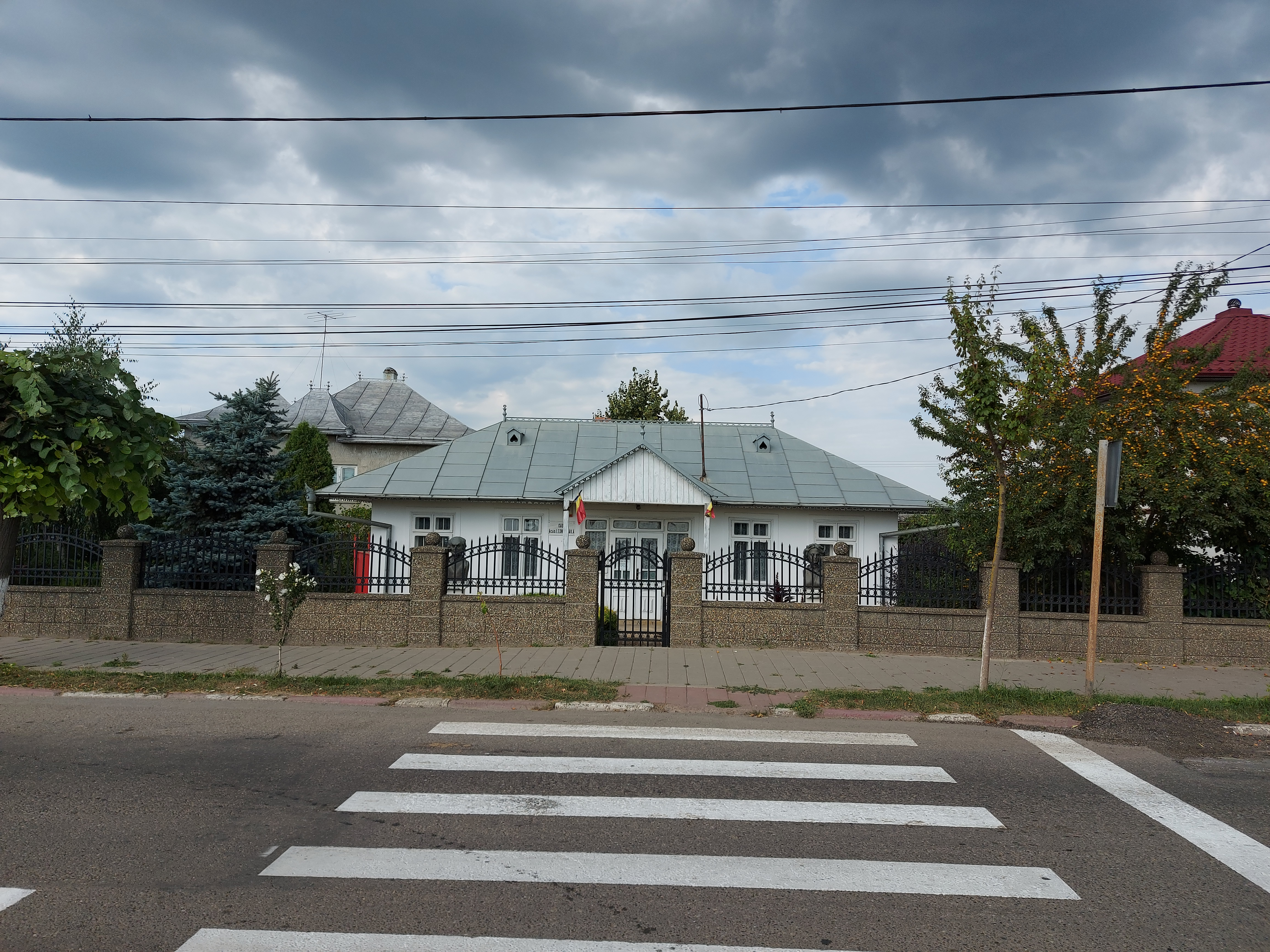 Casa Muzeu a Acad. Leon Dănăilă din Darabani, județul Botoșani, România.